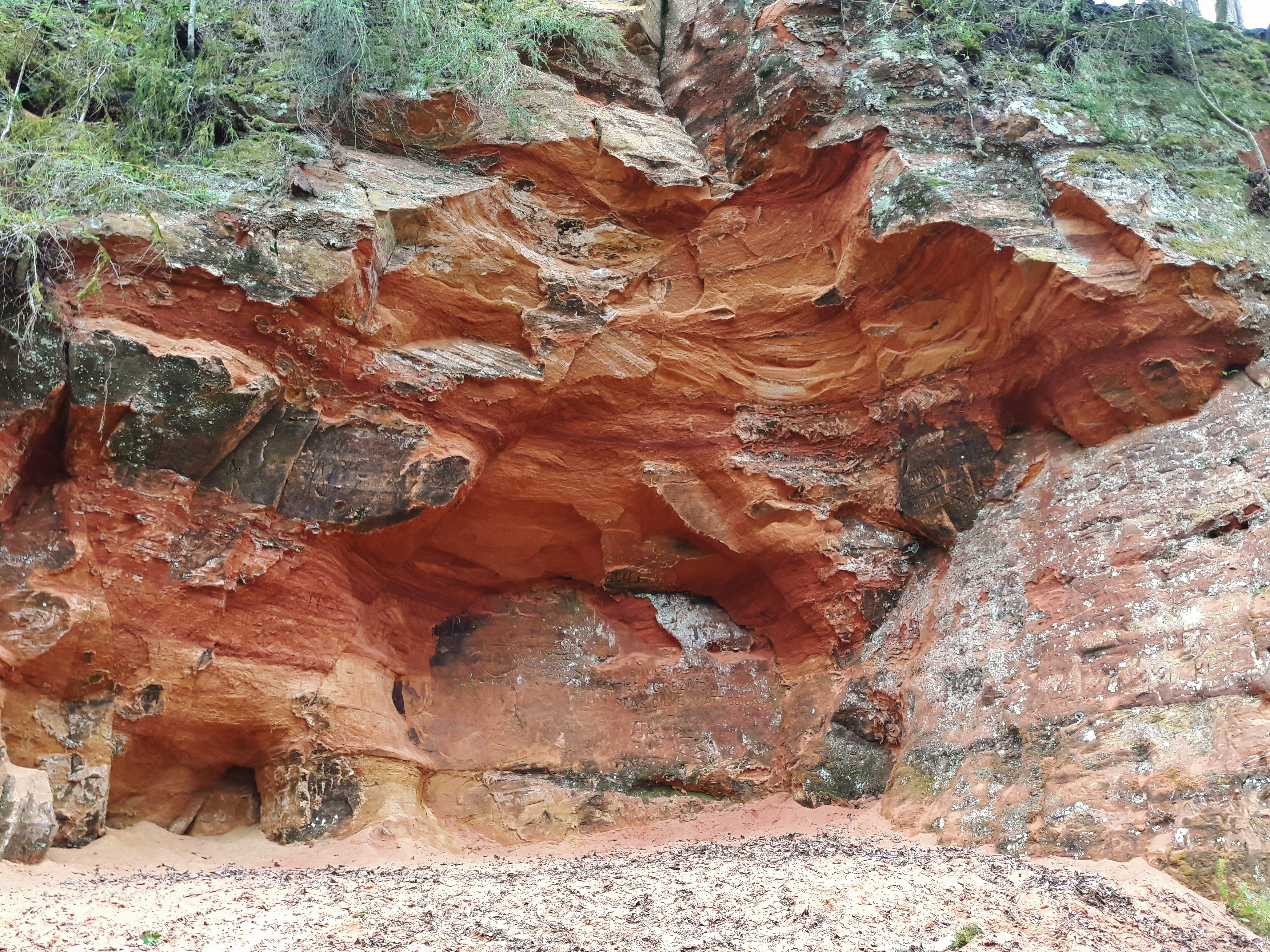 Raiskuma Sarkanās klintis